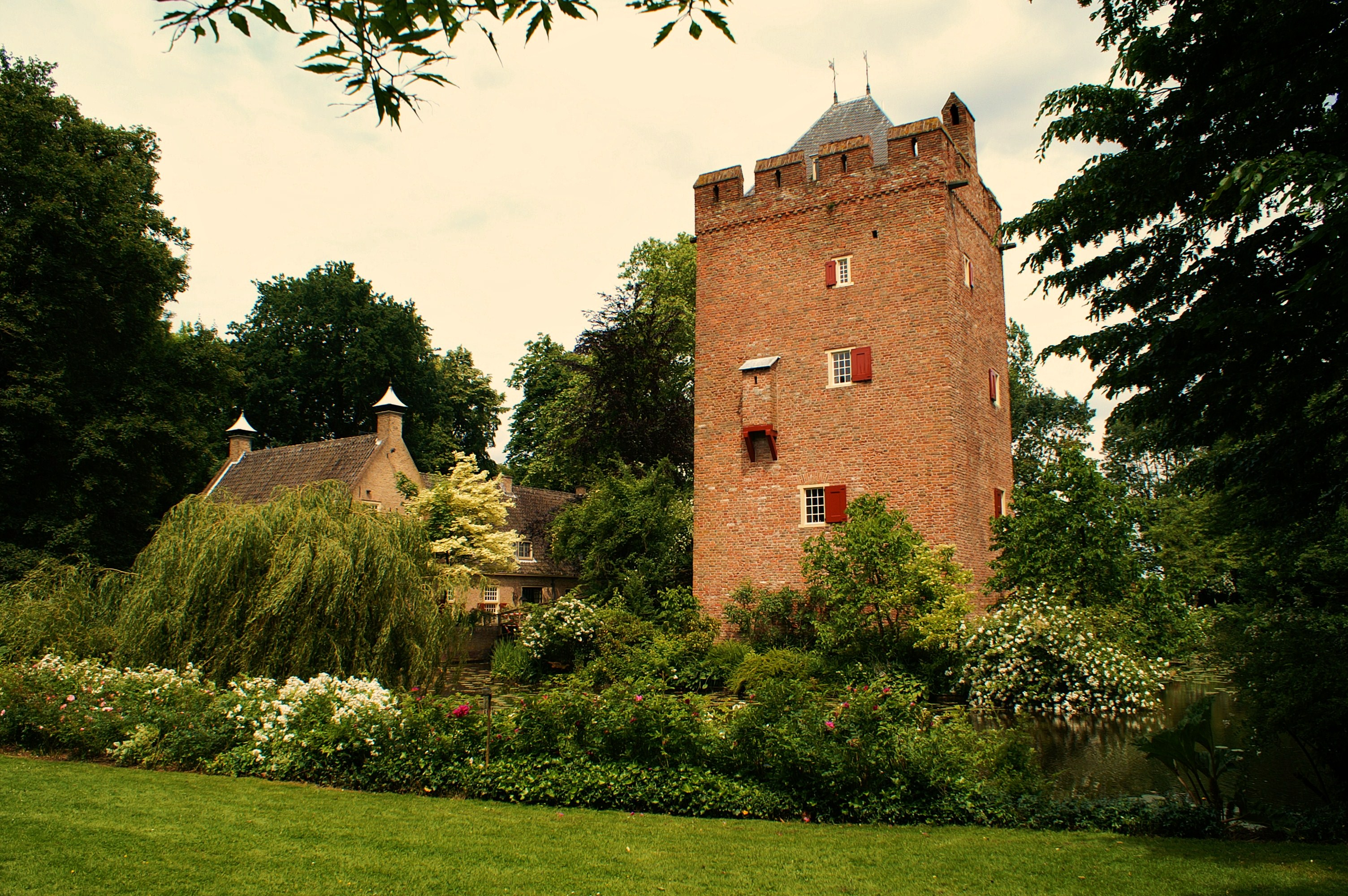 Ridderhofstad Lunenburg te Neerlangbroek.